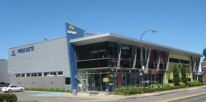 Nouvel édifice après rénovation au garage Pneus Ratté de Limoilou en 2000.